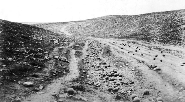 La valle dell'ombra della morte. R. Fenton